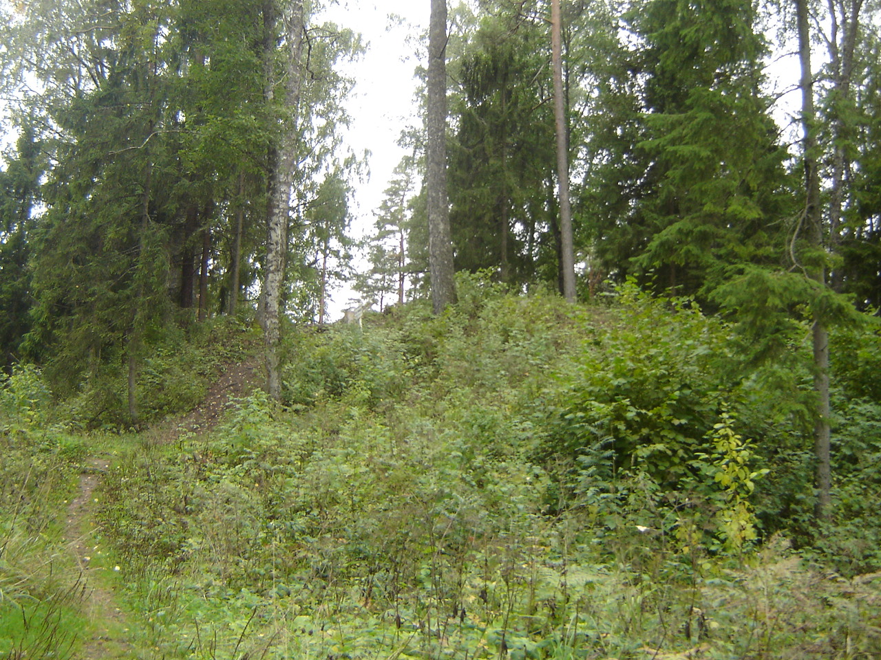 Keava linnamäe põjapoolne külg